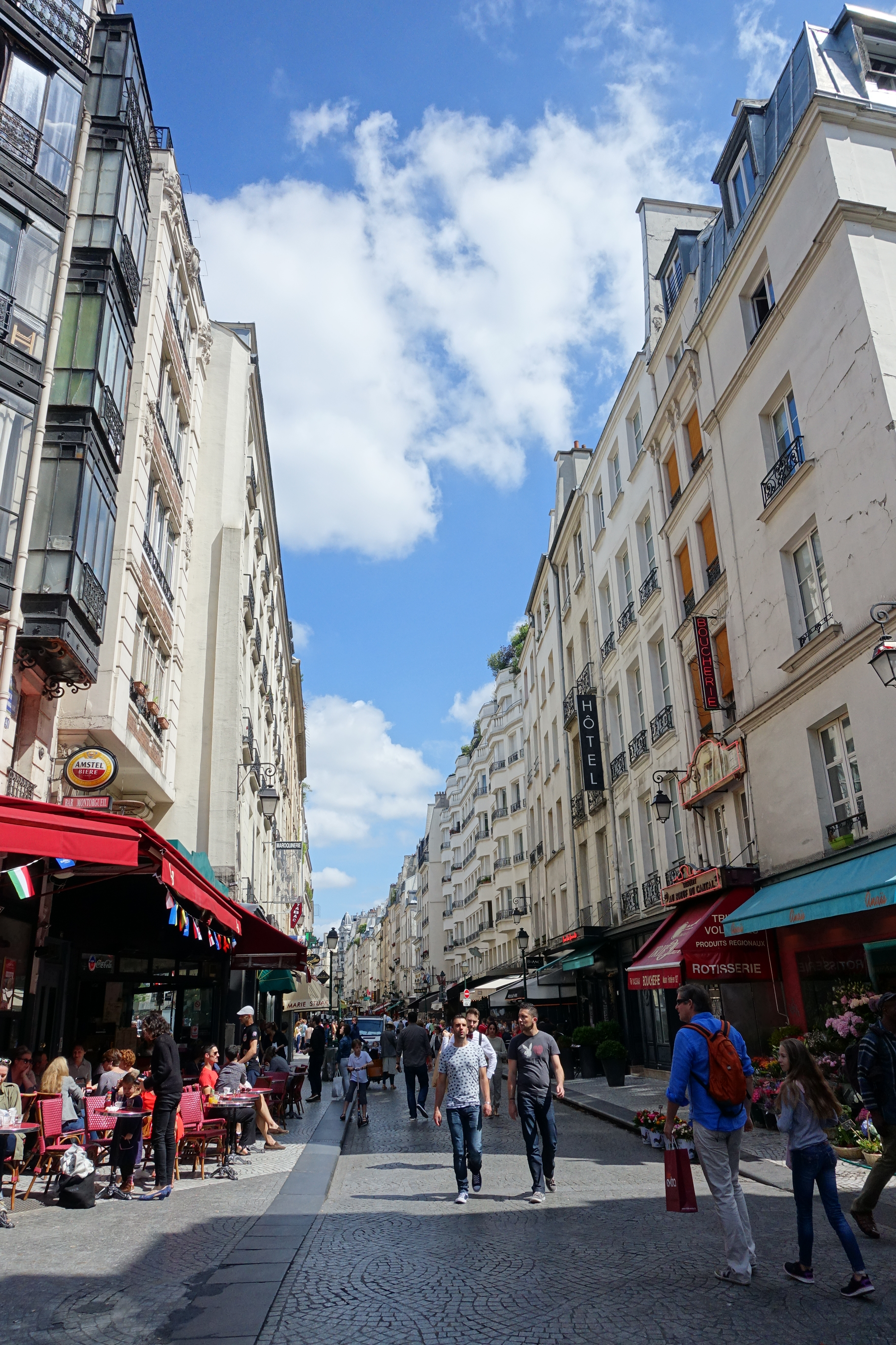 Rue Montorgueil @ Paris